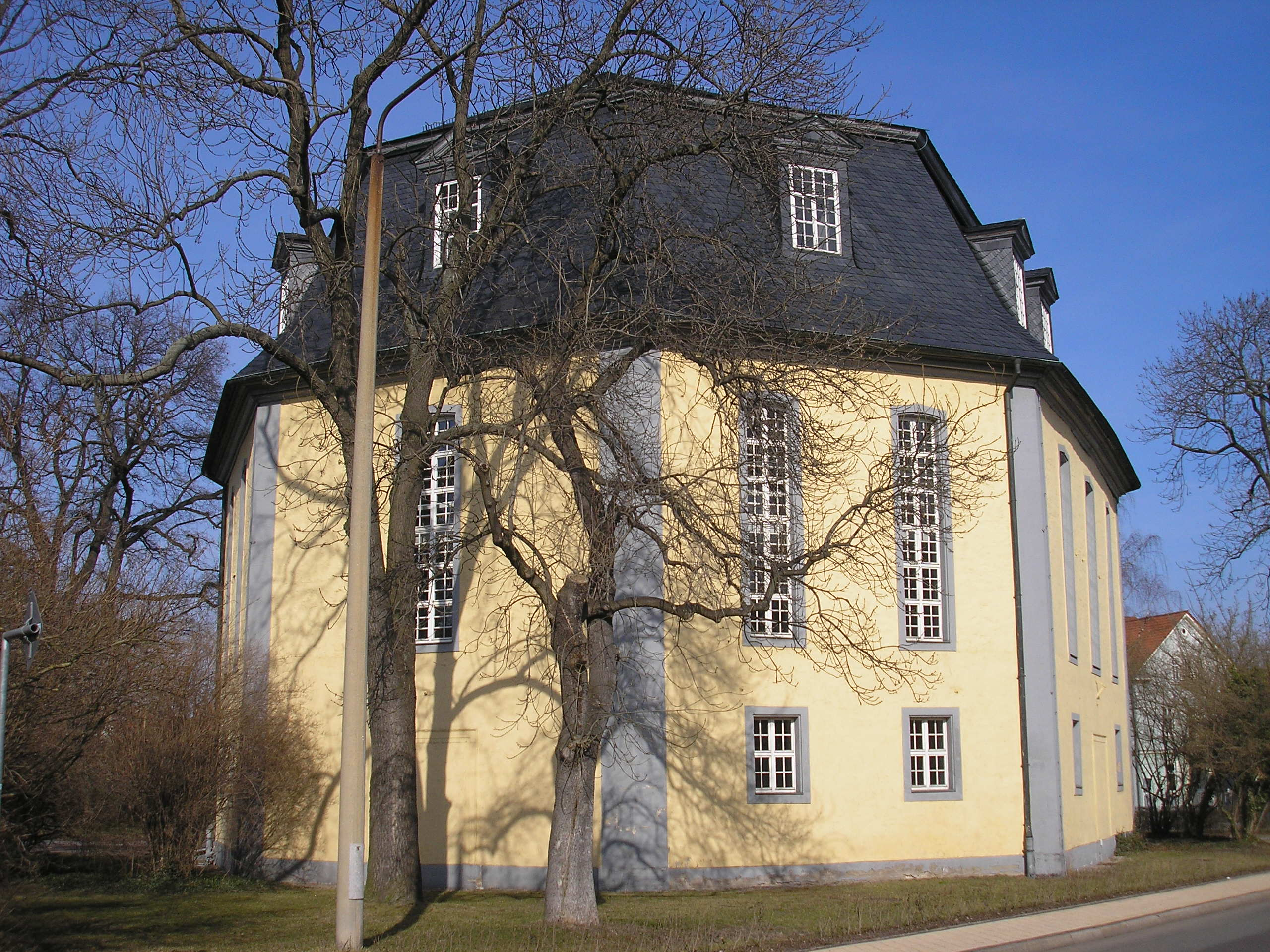 Die Gottesackerkirche in Arnstadt (Thüringen).